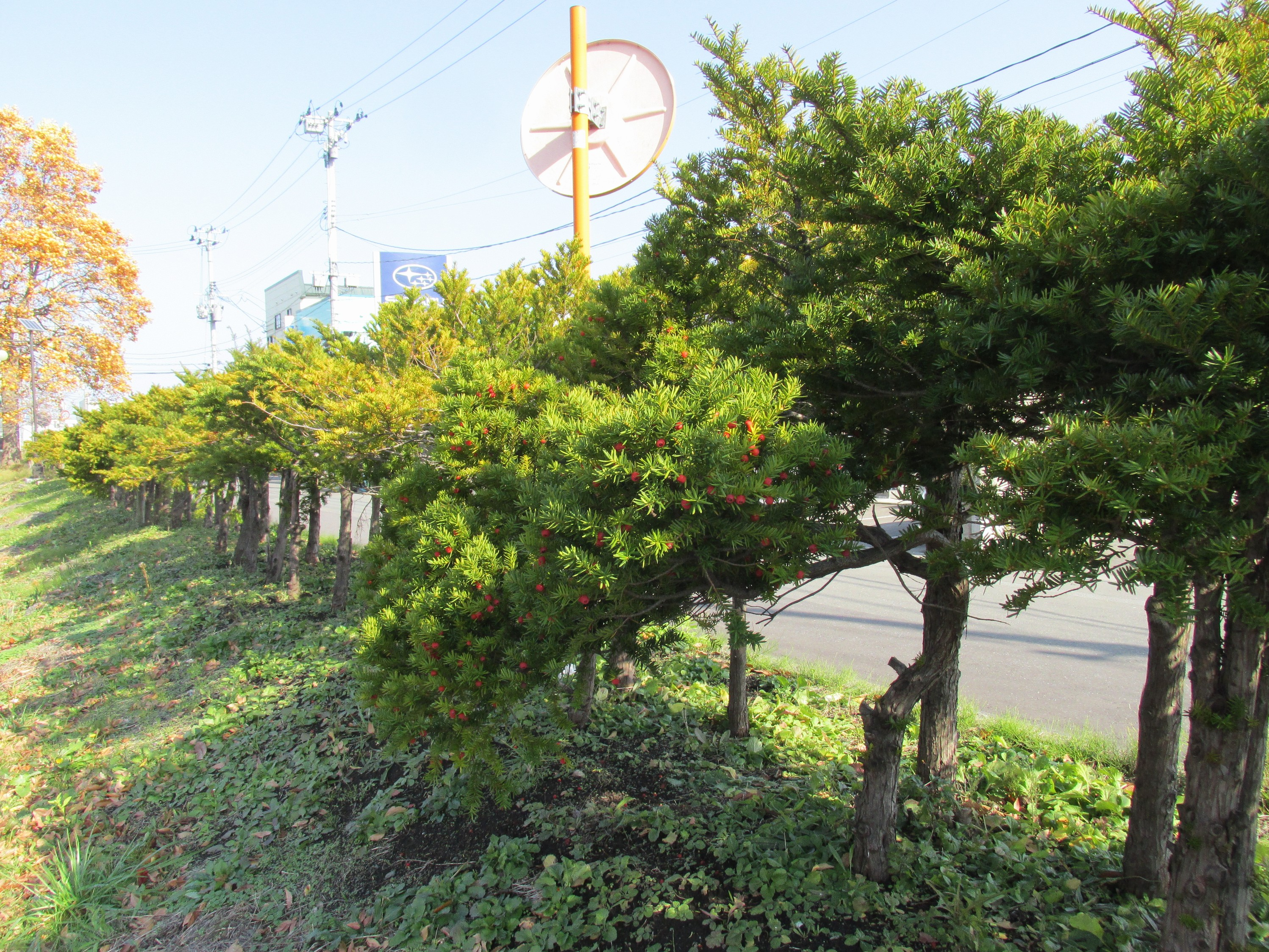 日本国,青森県青森市役所柳川庁舎生け垣,イチイの木,果実